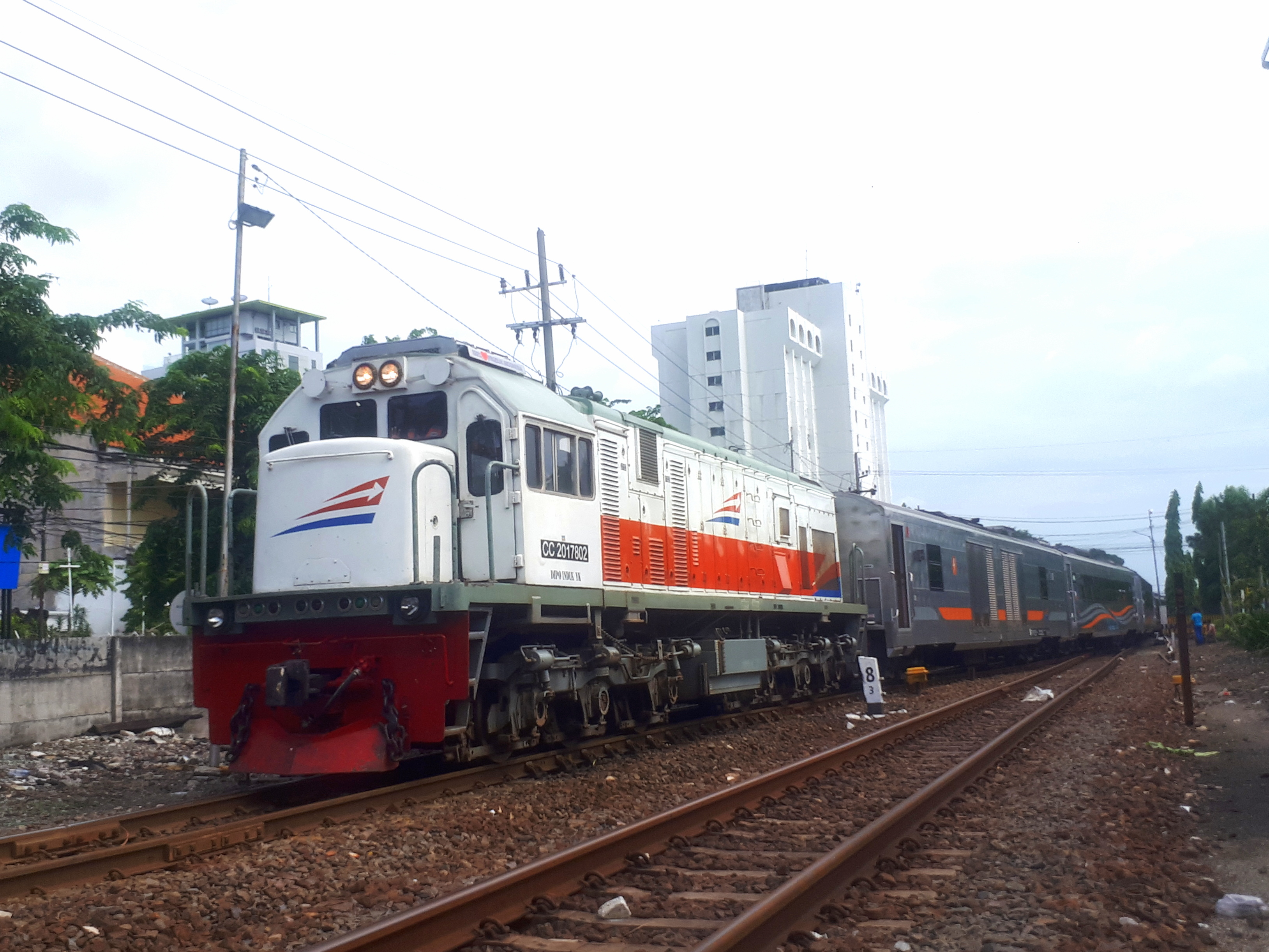 Kereta api Mutiara Timur saat meninggalkan Stasiun Surabaya Gubeng, 2020